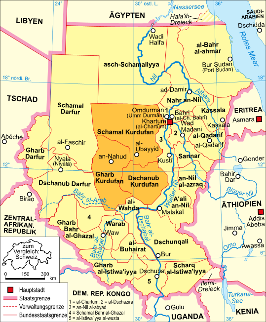 politische Karte des Sudan (Region Kurdufan)